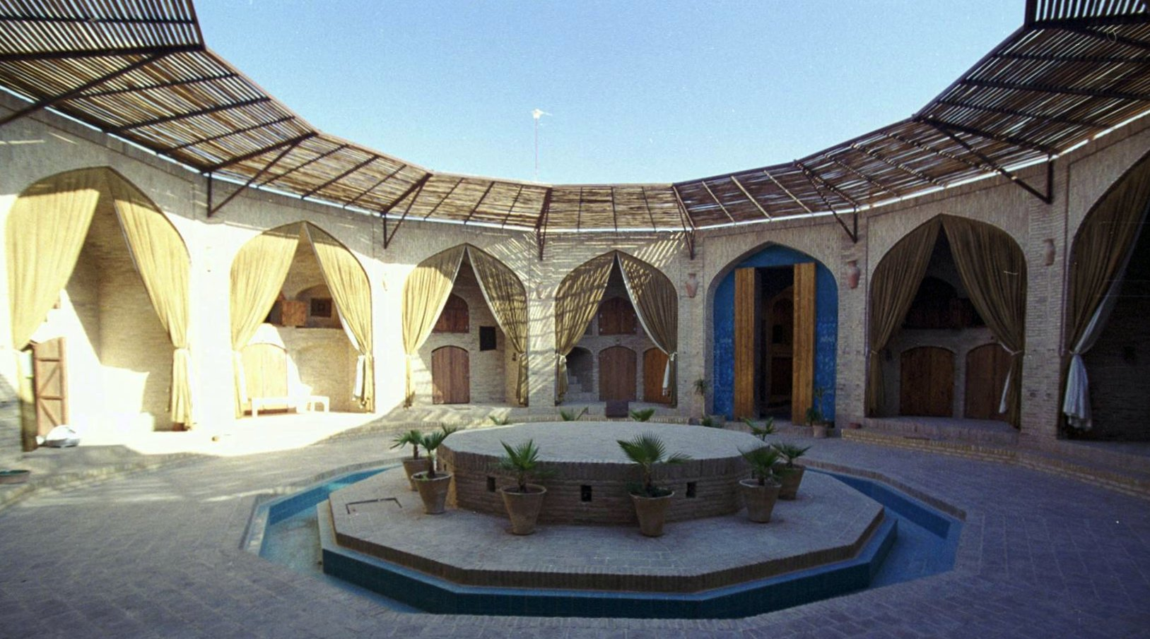 Caravanserai Zein-o-din, Yazd, Iran